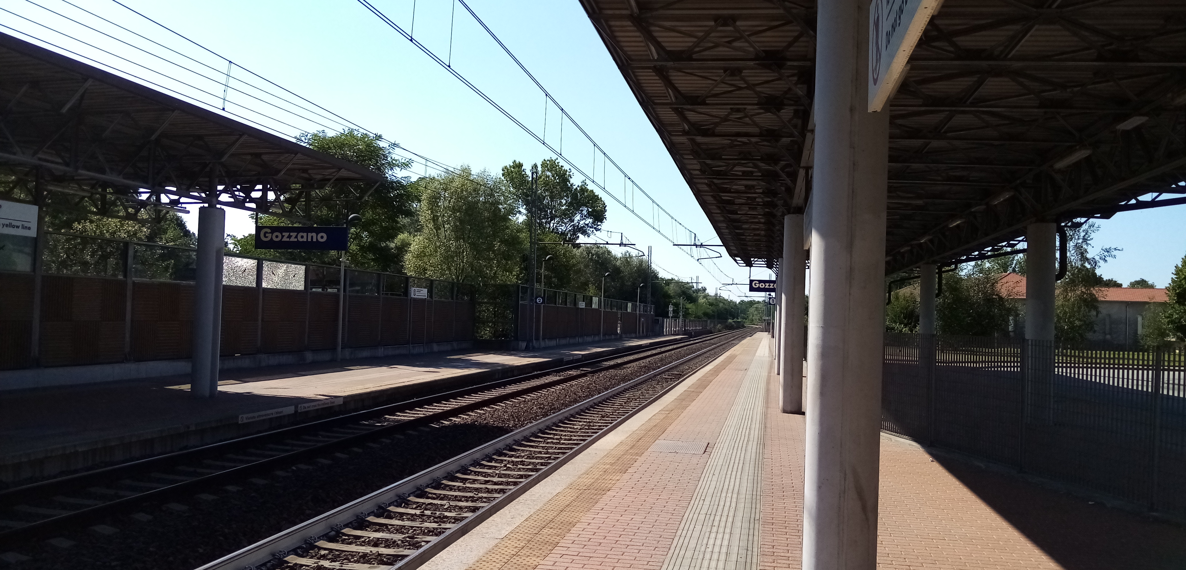 Stazione di Gozzano: binari lato Novara